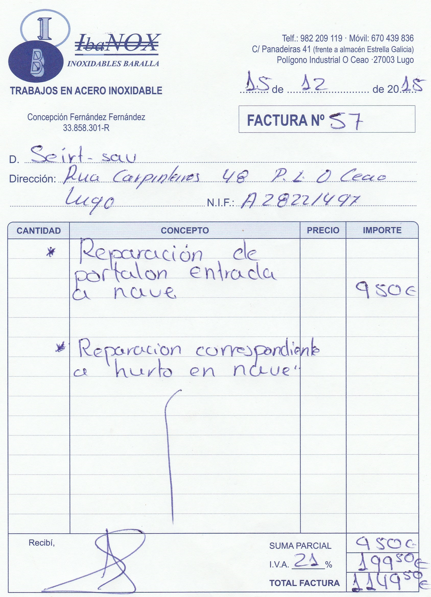 ryhurhyu5h